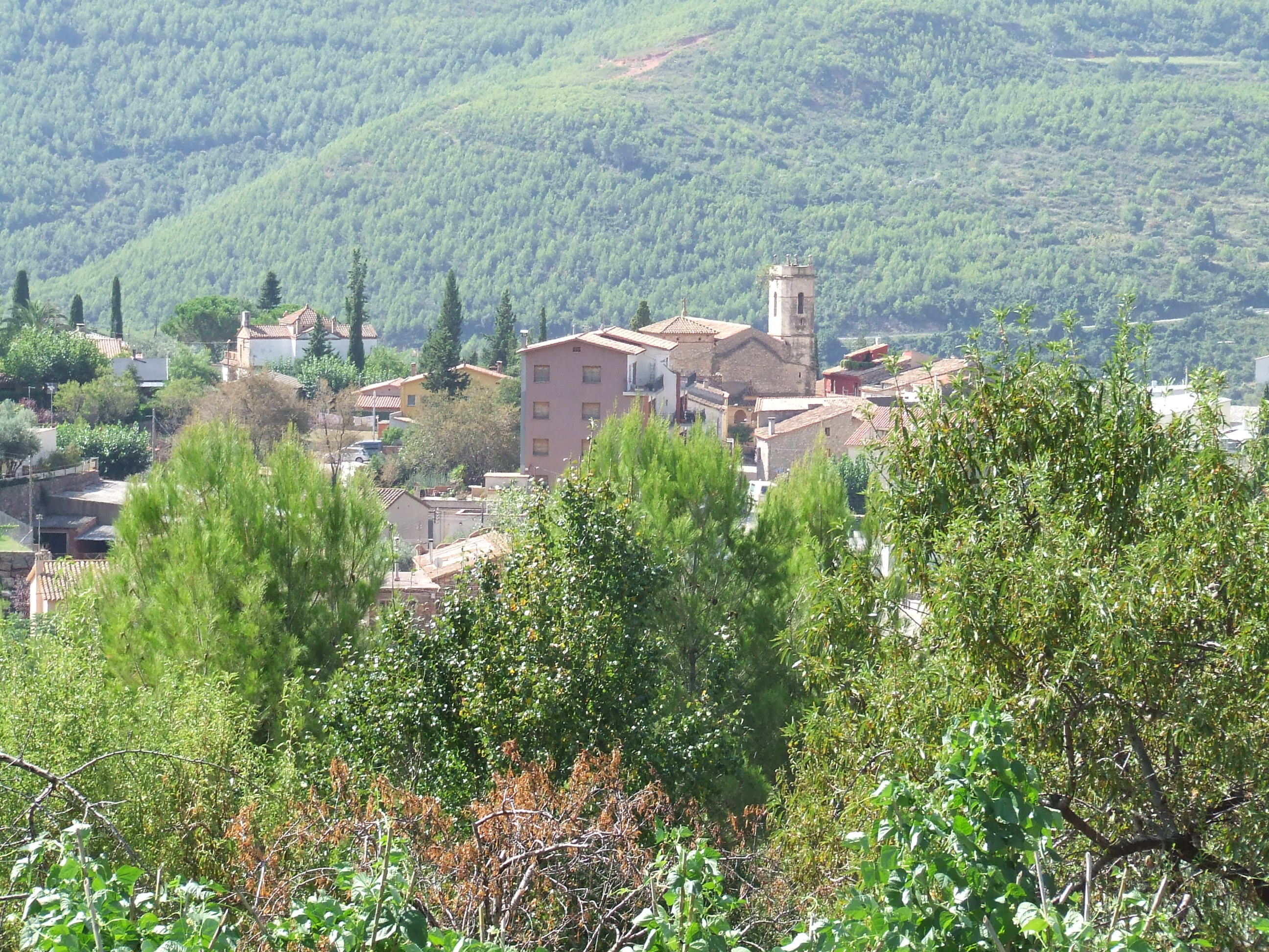 Riells del Fai (Bigues i Riells, Vallès Oriental)